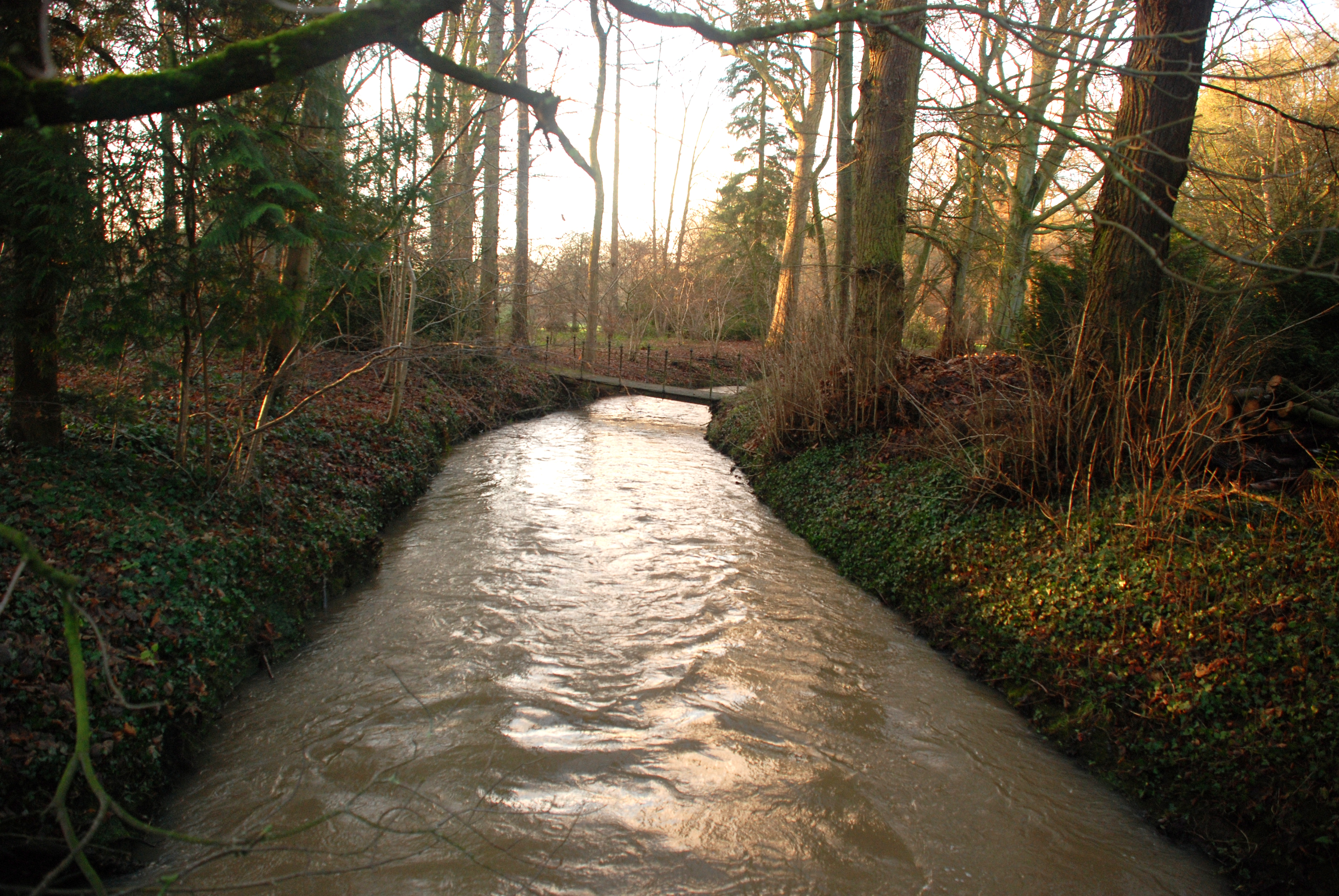 Belgique - Brabant wallon - Court-Saint-Etienne - rivière Orne